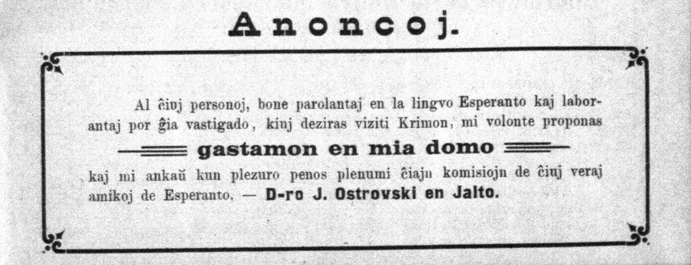 Anonco el la jaro 1895, per kiu d-ro J. Ostrovski el Jalto invitas parolantojn de Esperanto veni gasti al lia domo en Krimo (en hodiaŭa